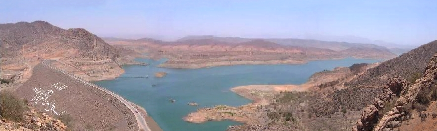 Barrage "Yousseh ben Tachfine" sur le Massa au Maroc